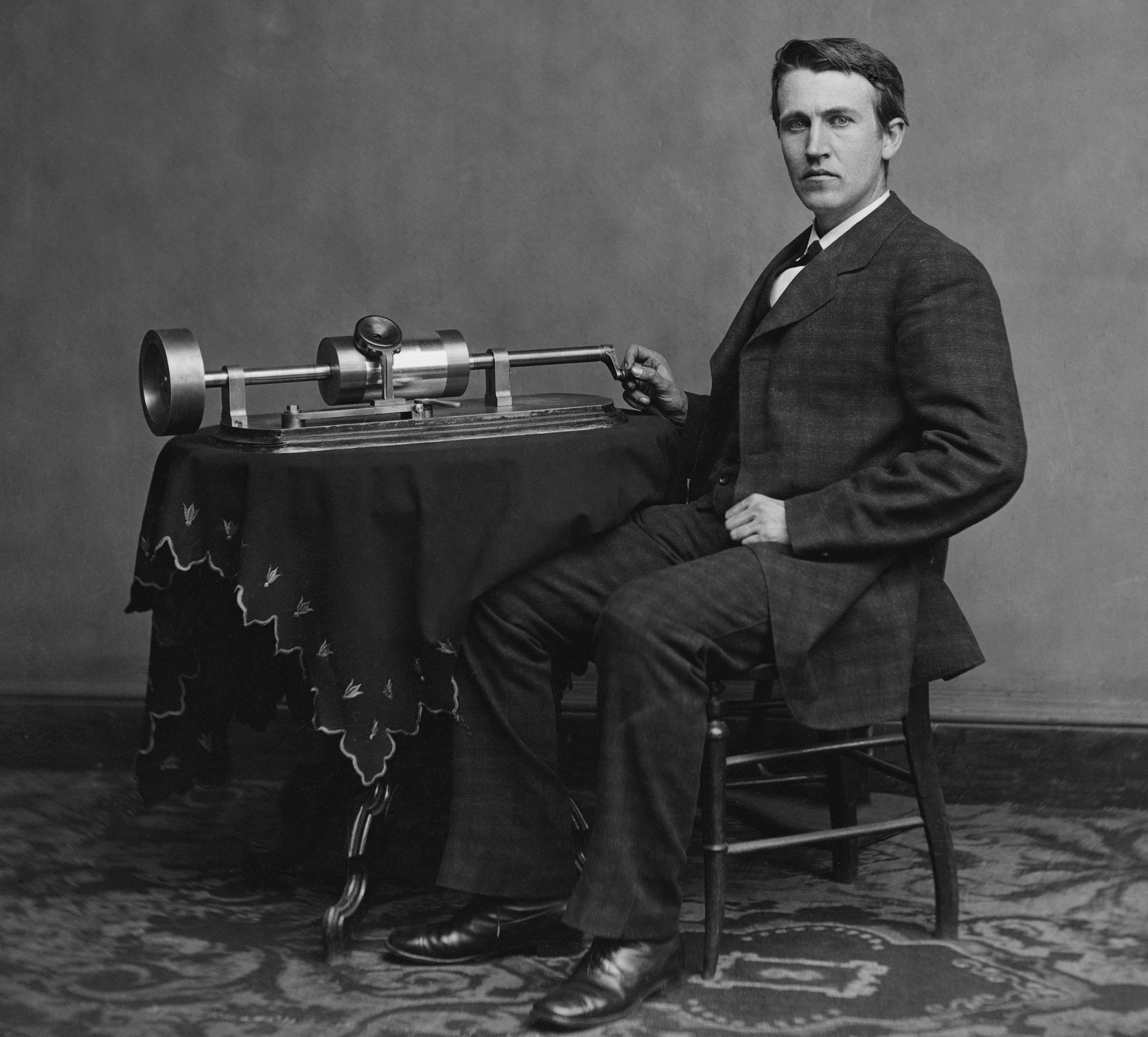 Edison med en tidig fonograf